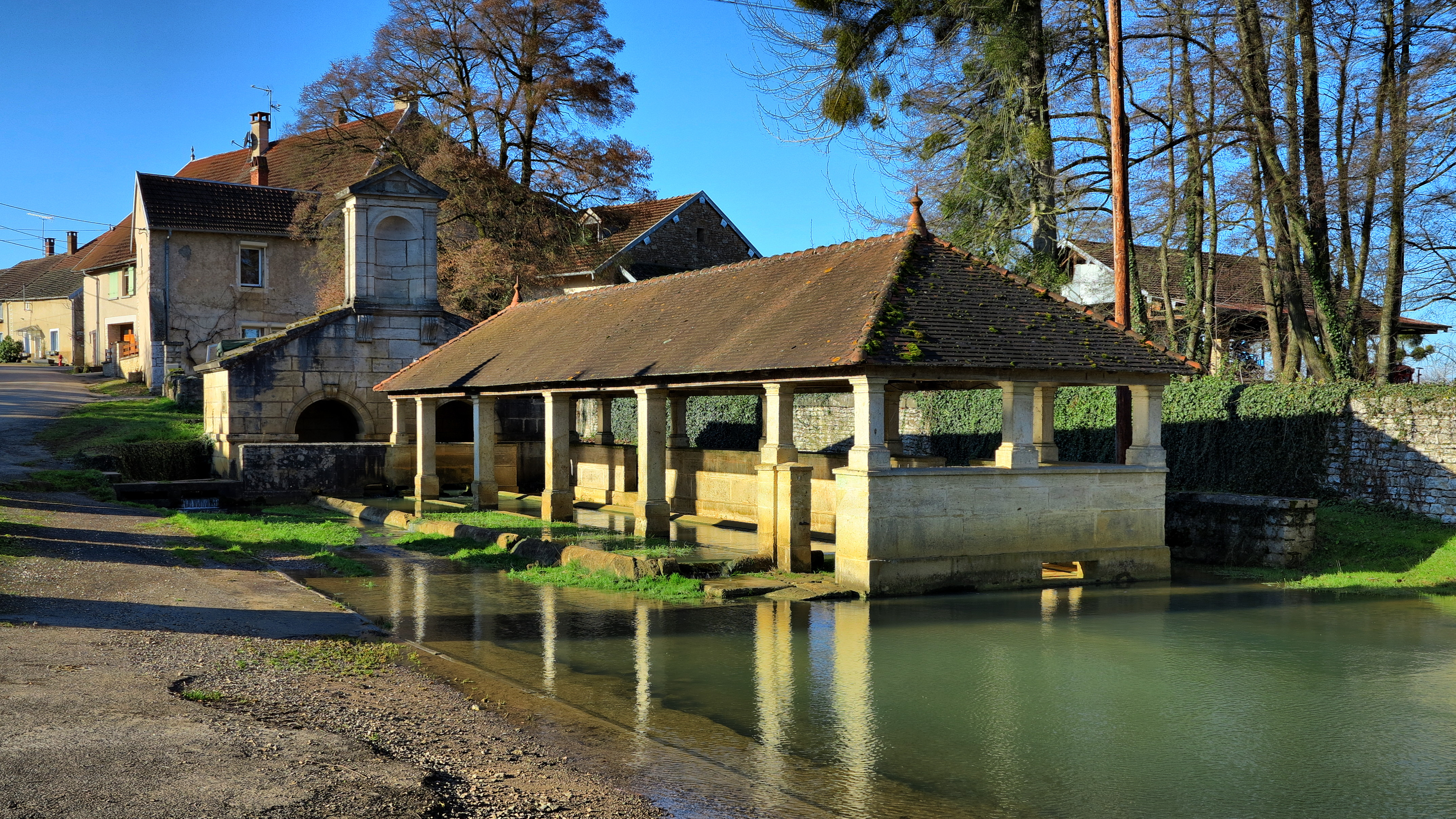 La fontaine-lavoir